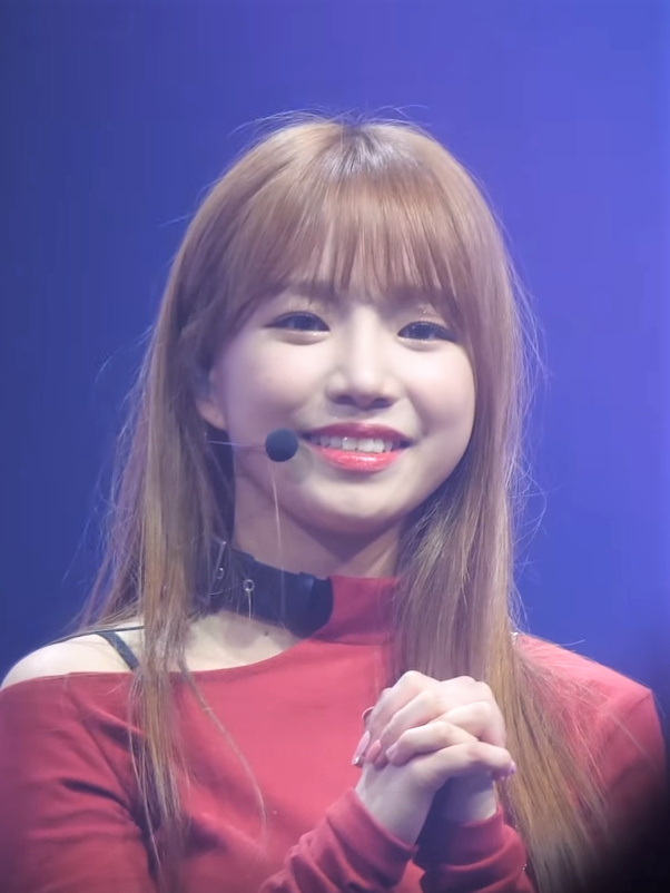 아이즈원 (IZ*ONE) '멤버별 데뷔소감' 직캠 Fancam @IZ*ONE SHOW-CON